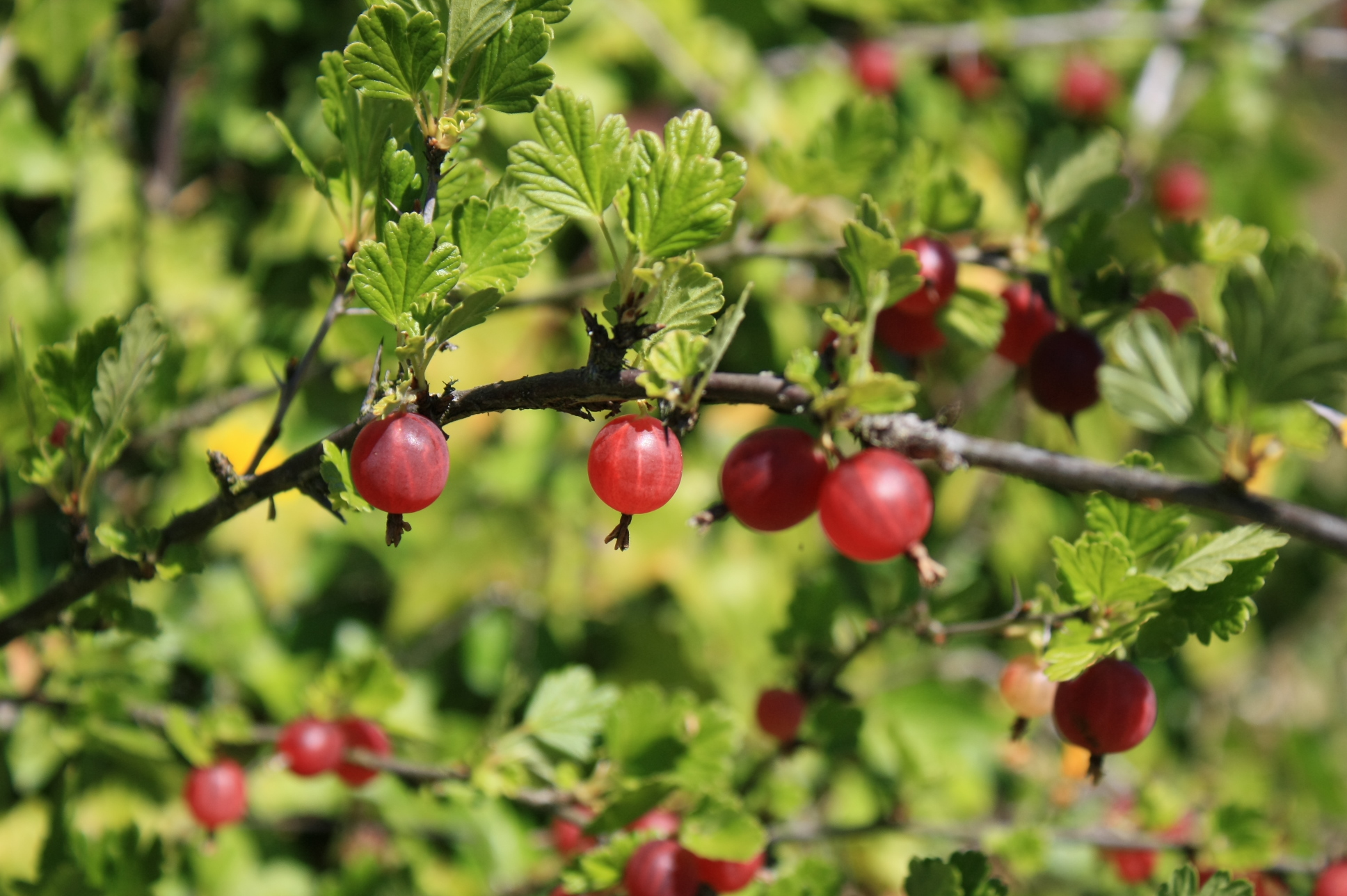 Grosellero (Ribes uva-crispa) y sus frutos.